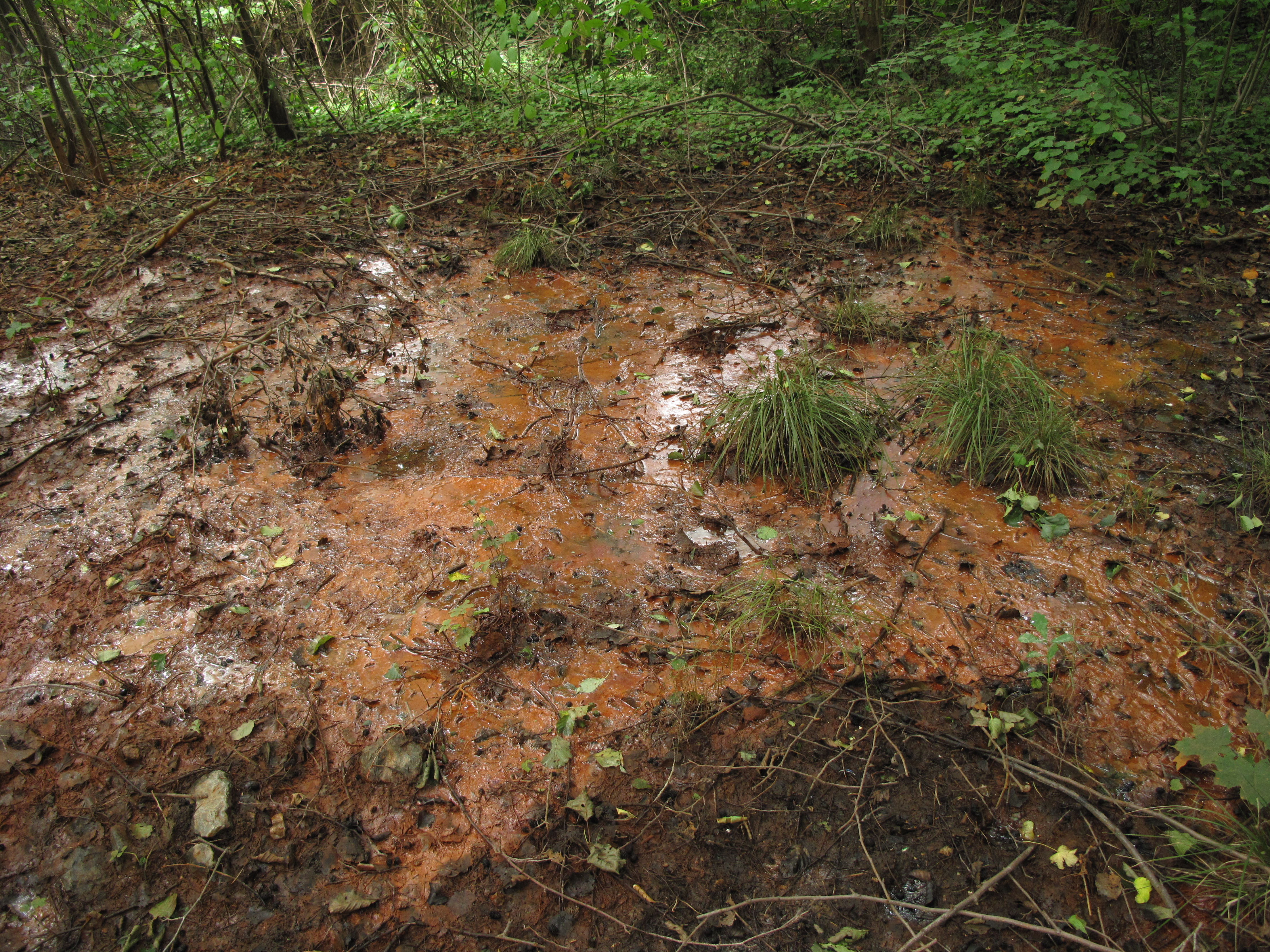 Přírodní památka Kopeckého pramen. Okres Plzeň-město, Česká republika.